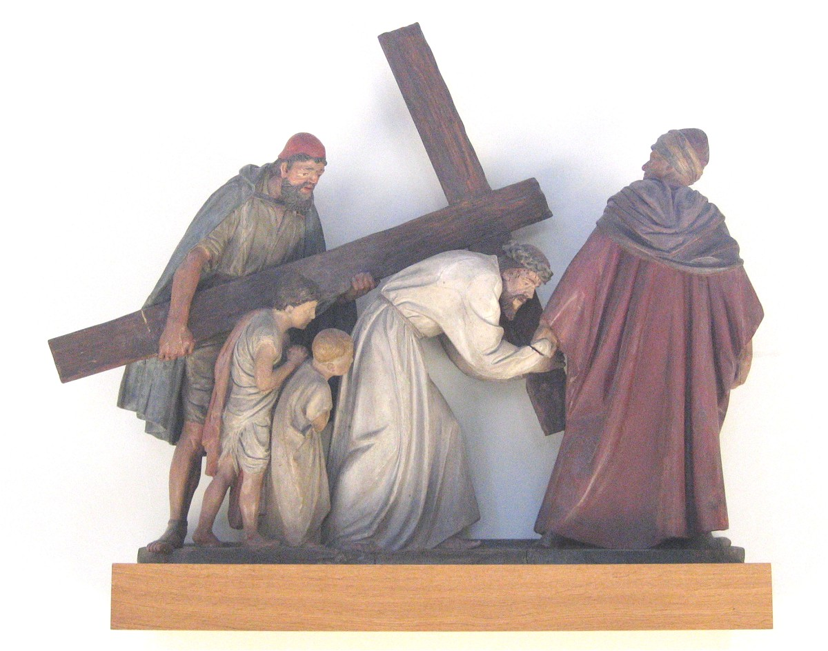 St. Paul in München, Kreuzwegstation